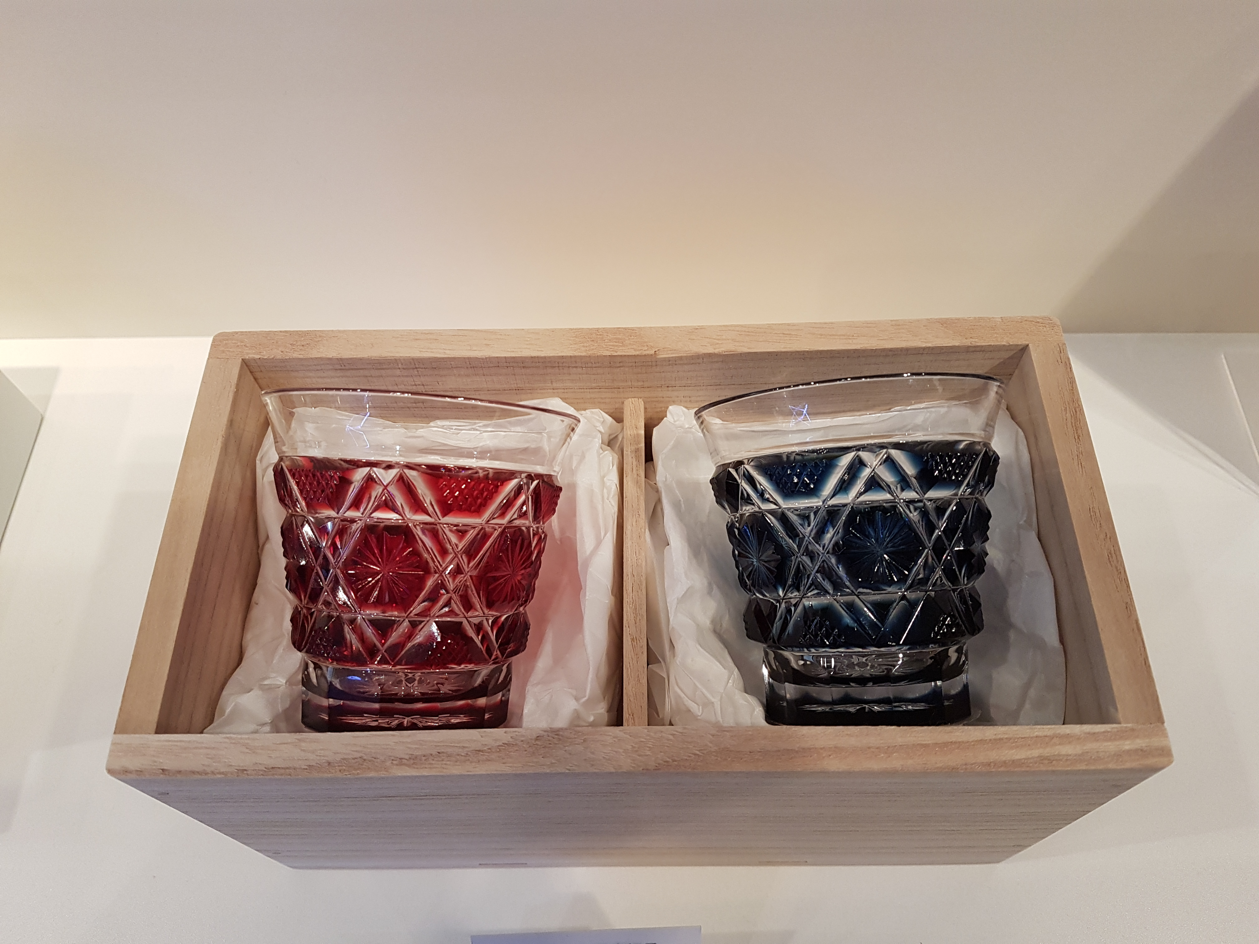 Satsuma Kiriko cut glass